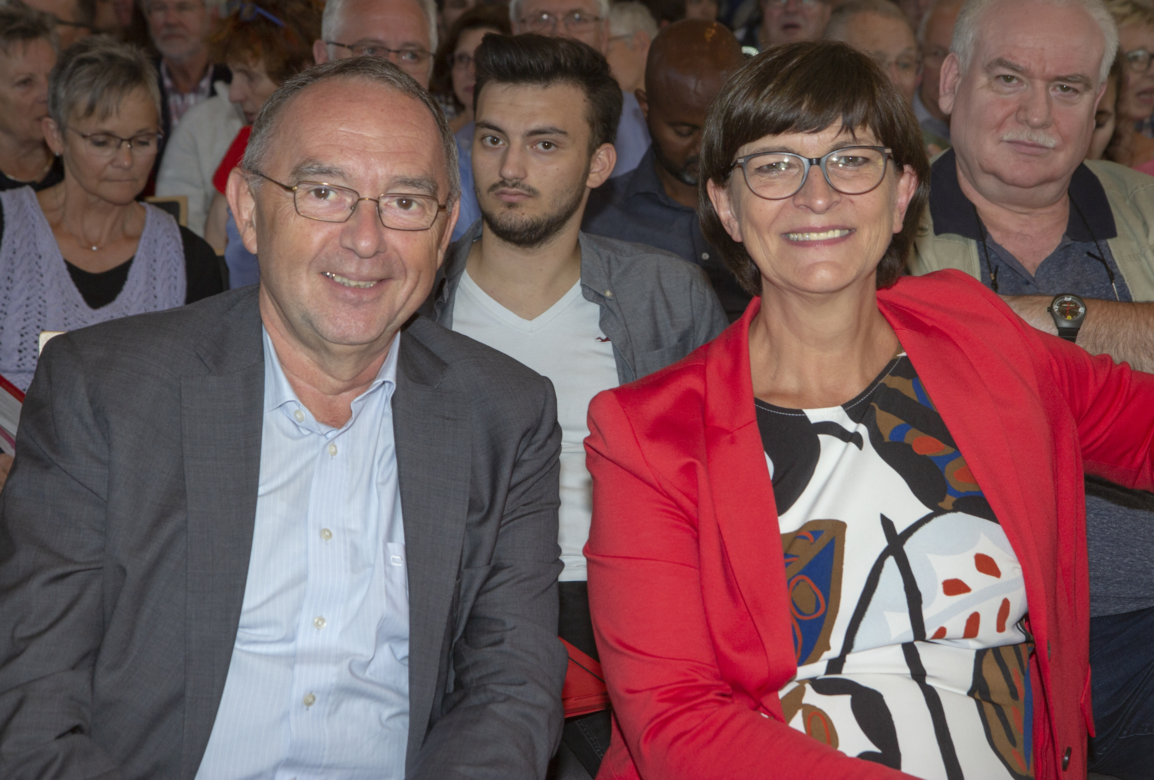 Team Saskia Esken und Norbert Walter-Borjans bei der SPD Regionalkonferenz zur Wahl des SPD-Vorsitzes am 10. September 2019 in Nieder-Olm.